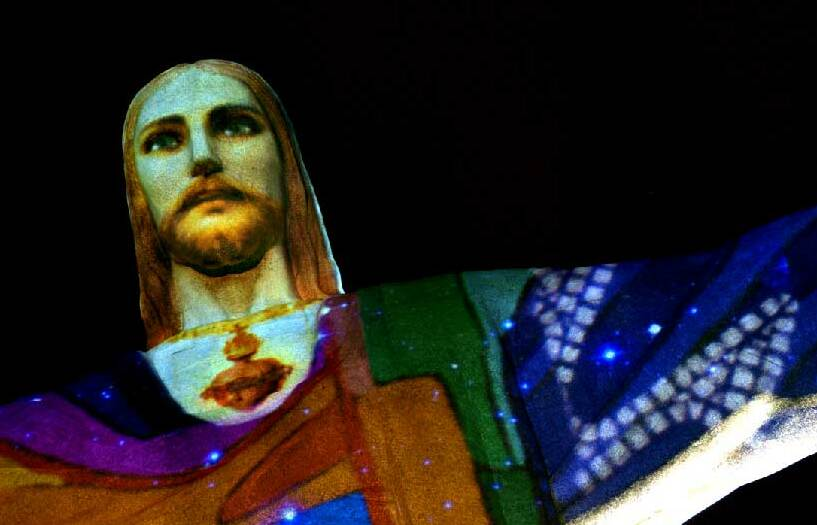 Pour la premiere fois, l'artiste performeur Gaspare Di Caro donne un visage à la statue du Christ rédempteur de Rio de Janeiro